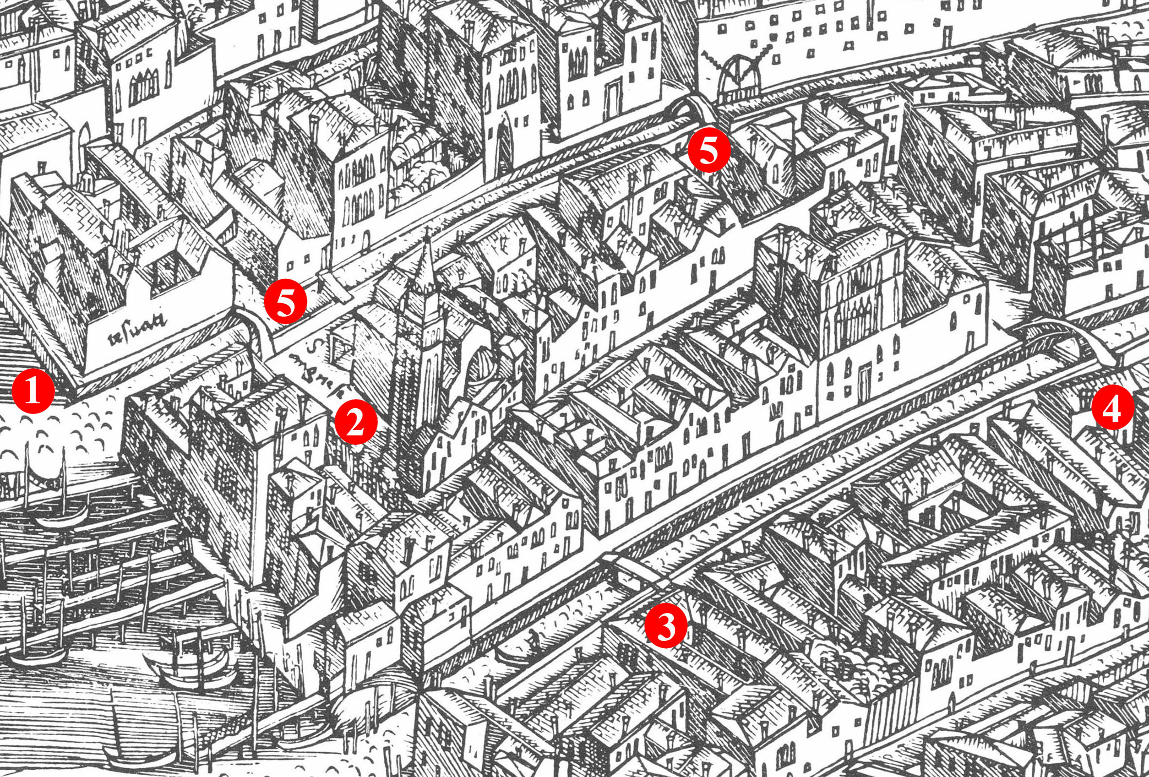 Джакопо де Барбарі. Дорсодуро (Фрагмент мапи 1500 року) 1. Церква Джезуаті або Санта-Марія дель Розаріо 2. Церква Сант' Аґнезе 3. Міст де Мецо 4. Міст Сан Віо 5. Зниклі мости на вулиці (ріо-тера) Марка Фоскаріні